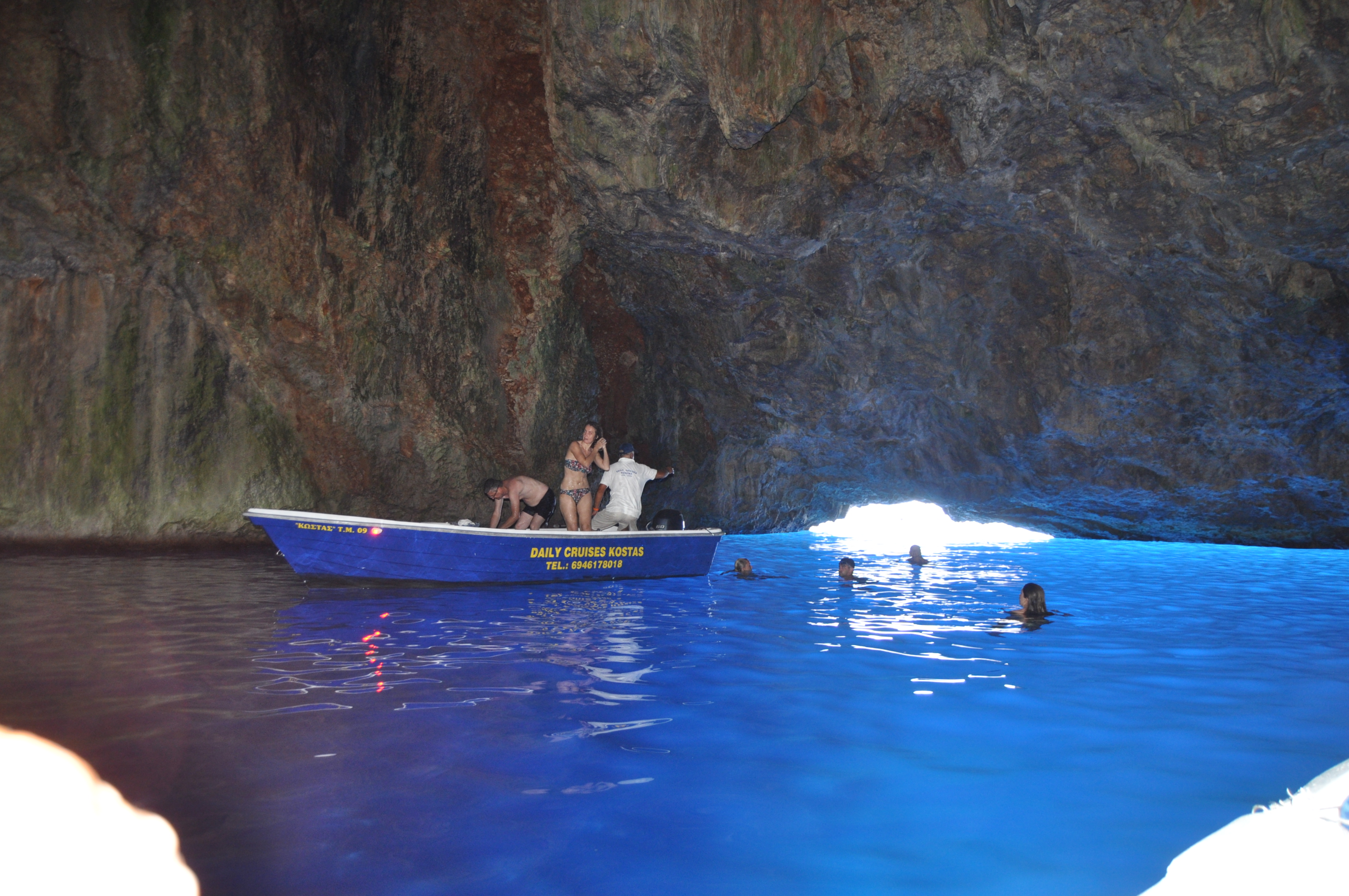 Δωδεκάνησα ,Καστελόριζο,Μπλέ Σπηλιά This is a photography of Natura 2000 protected area with ID GR4210004